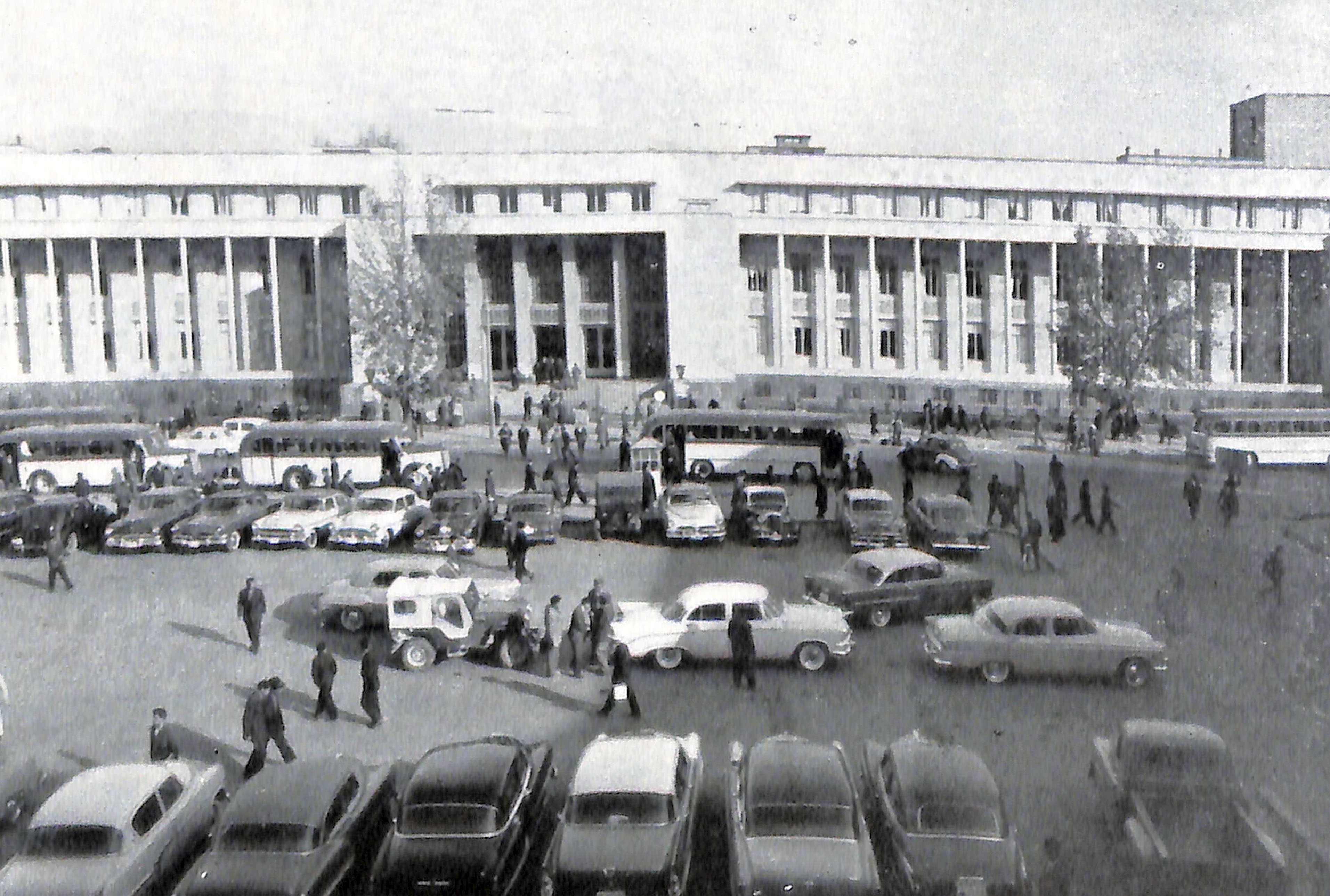 بانک ملی ایران شعبه سبزه میدان بازار